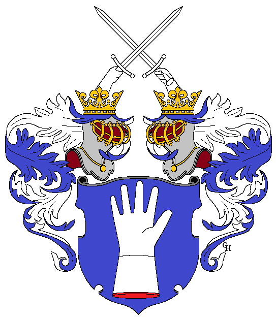 Wappen des österreichischen Offiziers Anton von Meinong (1799–1870), ab 27. Juni 1858 Generalmajor, am 30. August 1859 pensioniert, verliehen anlässlich seiner Erhebung in den österreichischen Ritterstand mit dem Prädikat "von Handschuchsheim" am 17. Oktober 1851. Zeichnung von Gerd Hruška ( Für weitere Informationen zu dieser Standeserhebung siehe (